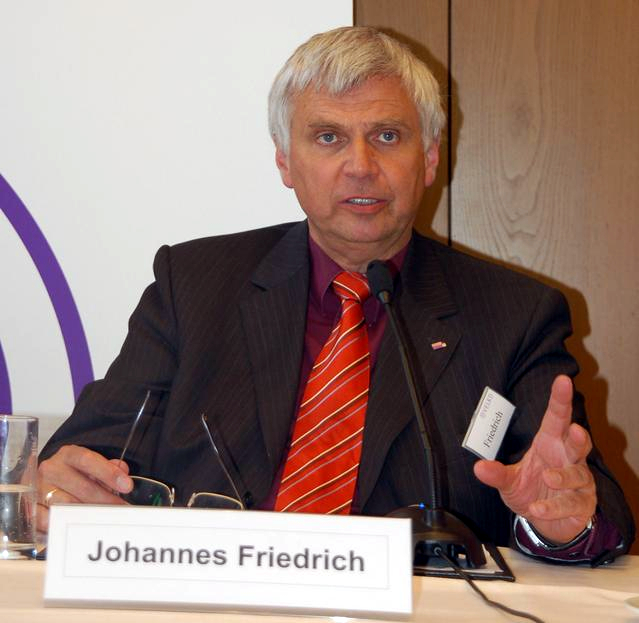 Johannes Friedrich, Landesbischof der Evangelisch-Lutherischen Kirche in Bayern sowie leitender Bischof der Vereinigten Evangelisch-Lutherischen Kirche Deutschlands (VELKD), bei einer Pressekonferenz während der EKD-Synode vom April/Mai 2009 in Würzburg, Deutschland.